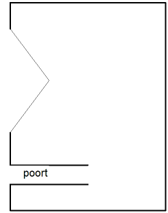 schema basreflex luidsprekerbox, eigen tekening Caseman